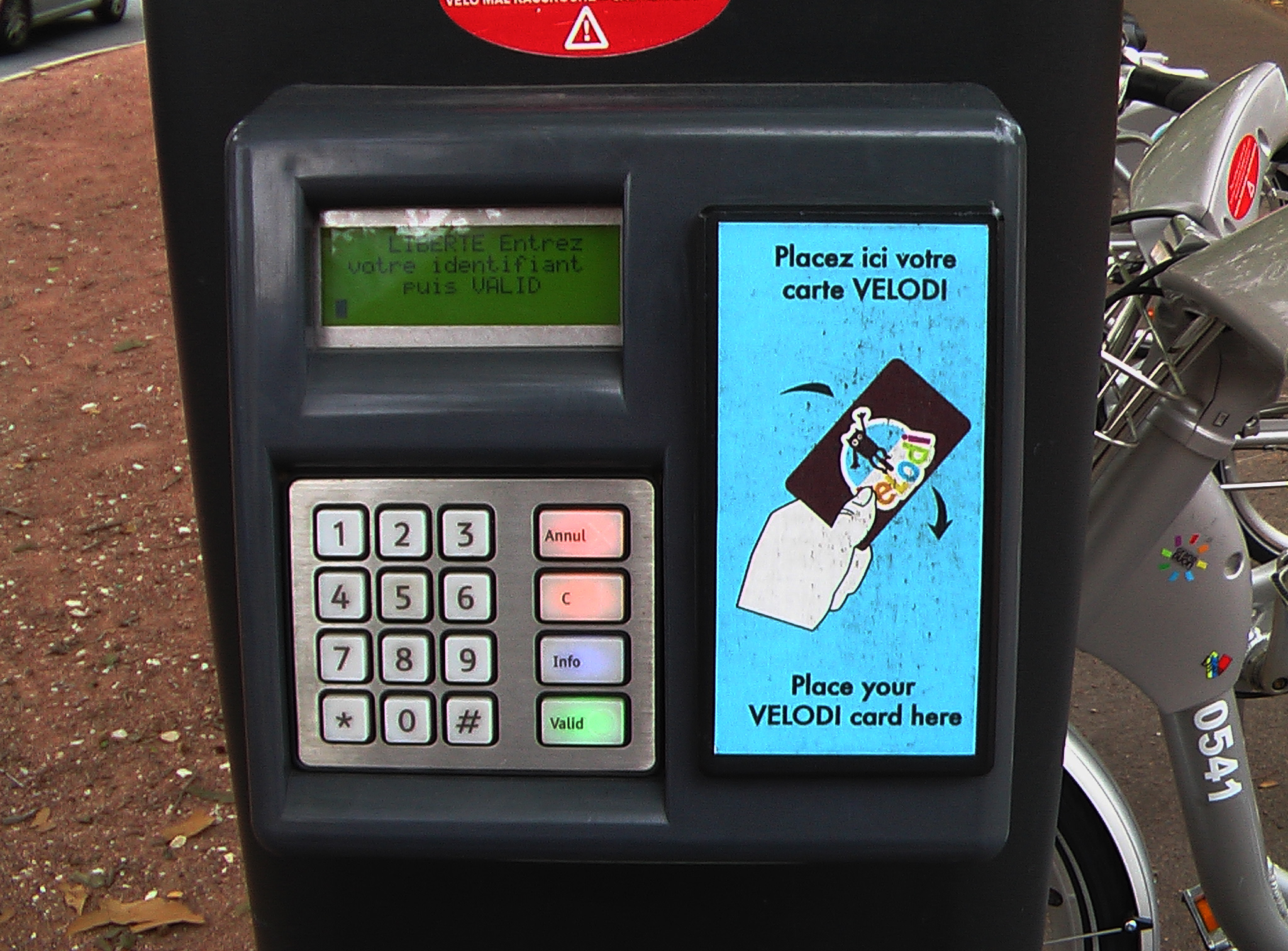 Clavier d'une borne Velodi, Dijon